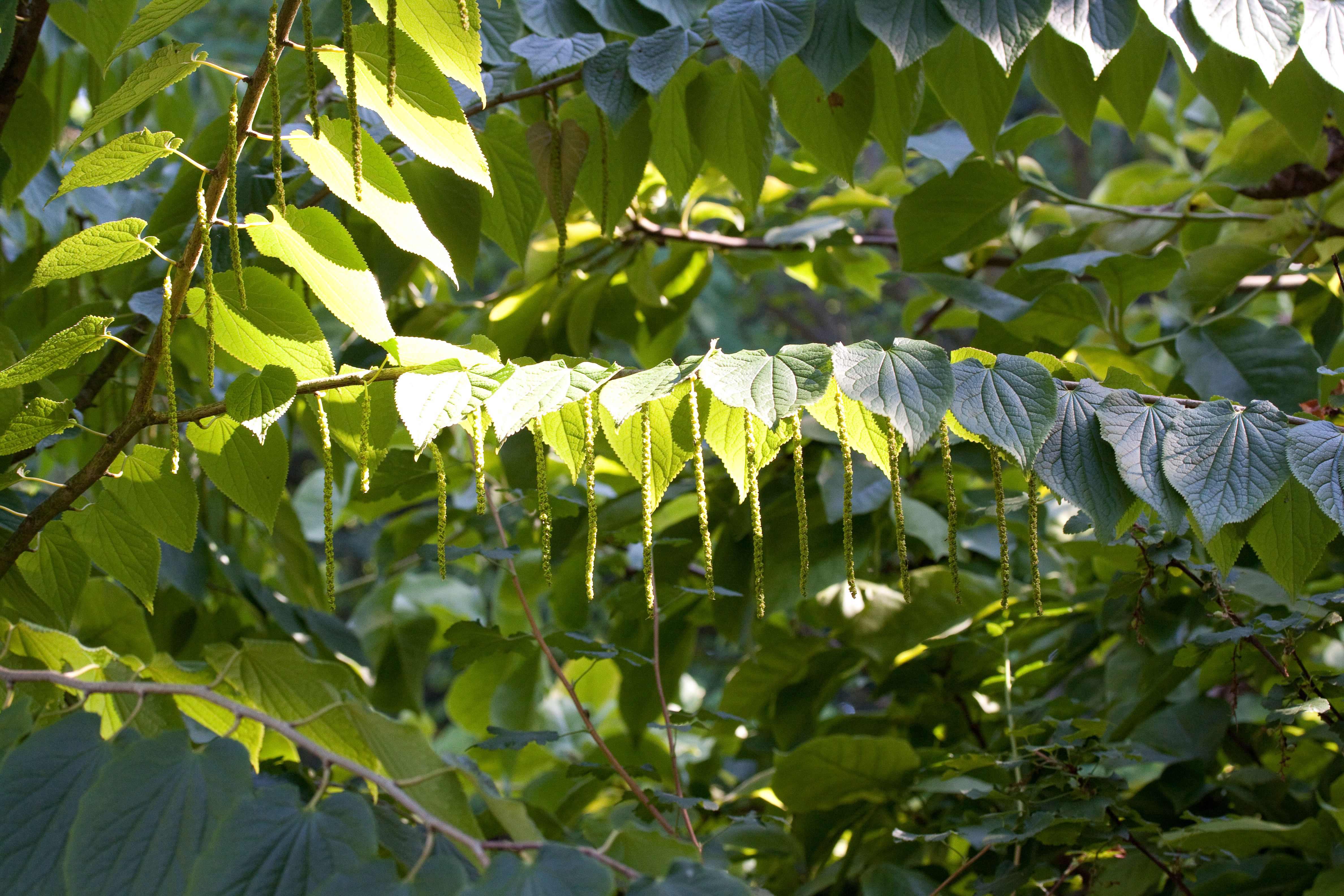 Tetracentron sinense - Feuilles et fleurs - Jardin botanique de Strasbourg - France